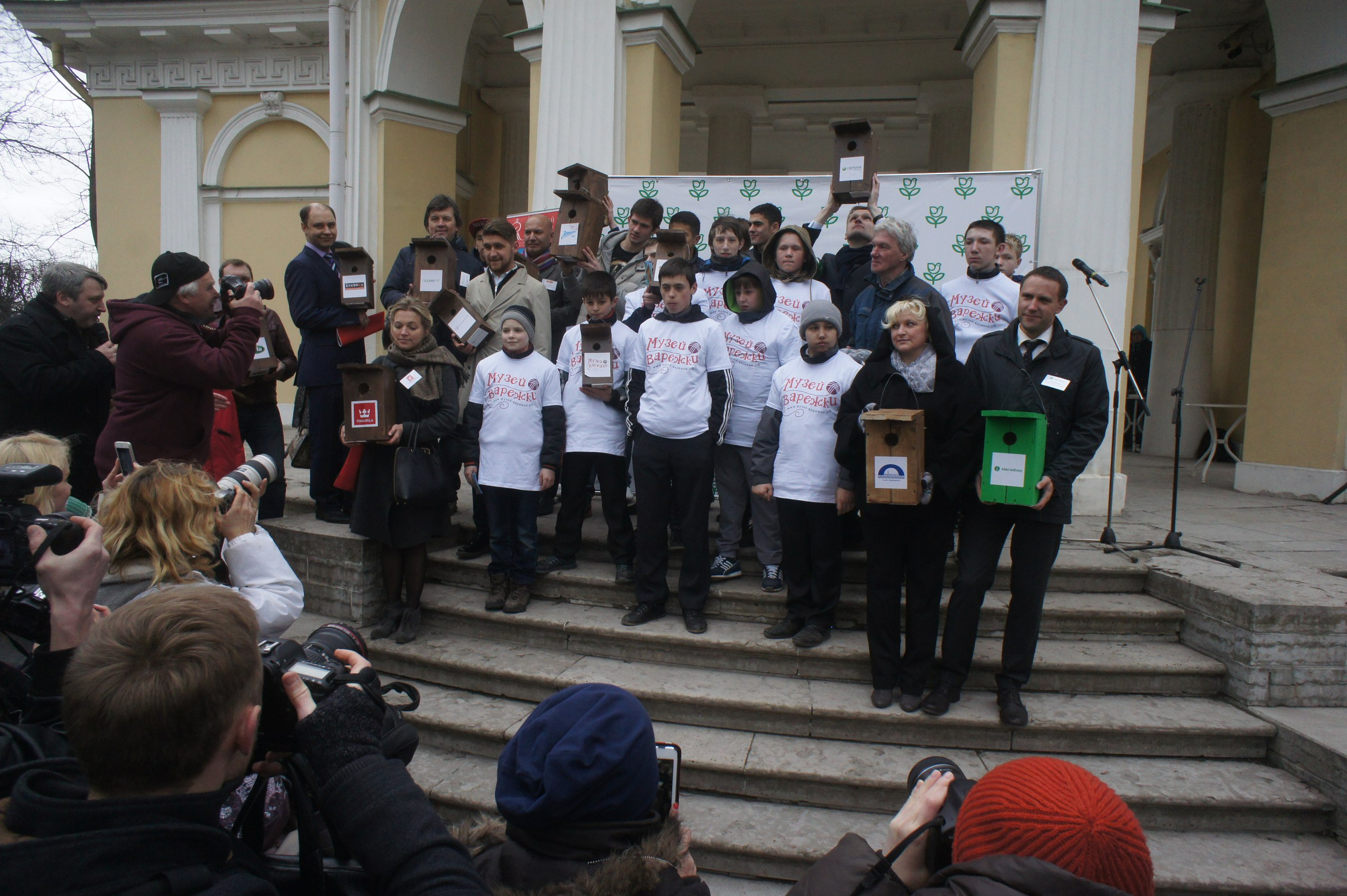 Спонсоры и участники акции "Скворцы прилетели" в Михайловском саду